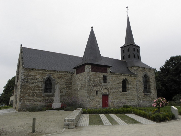 Église des trois Marie (Marie-Madeleine, Marie-Jacobé et Marie-Salomé) de Cardroc (35).